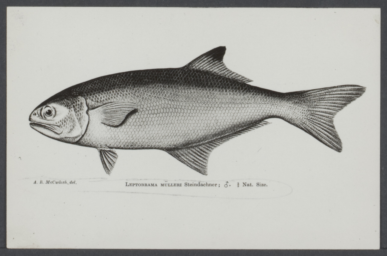 Academische Collecties: 1899-1900, Siboga-expeditie naar Nederlands Oost-Indië, onder leiding van Max Wilhelm Carl Weber